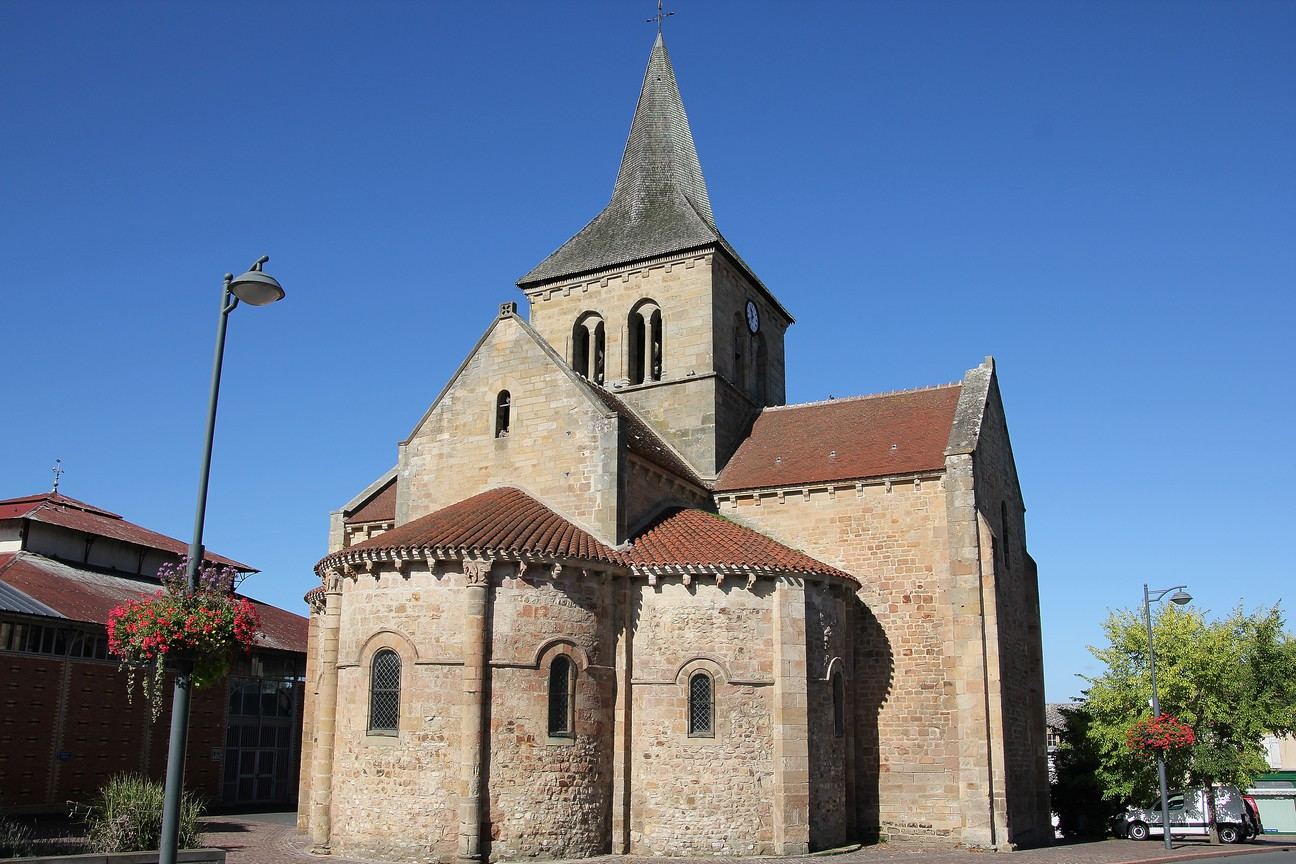 Lurcy Levis Eglise St Martin